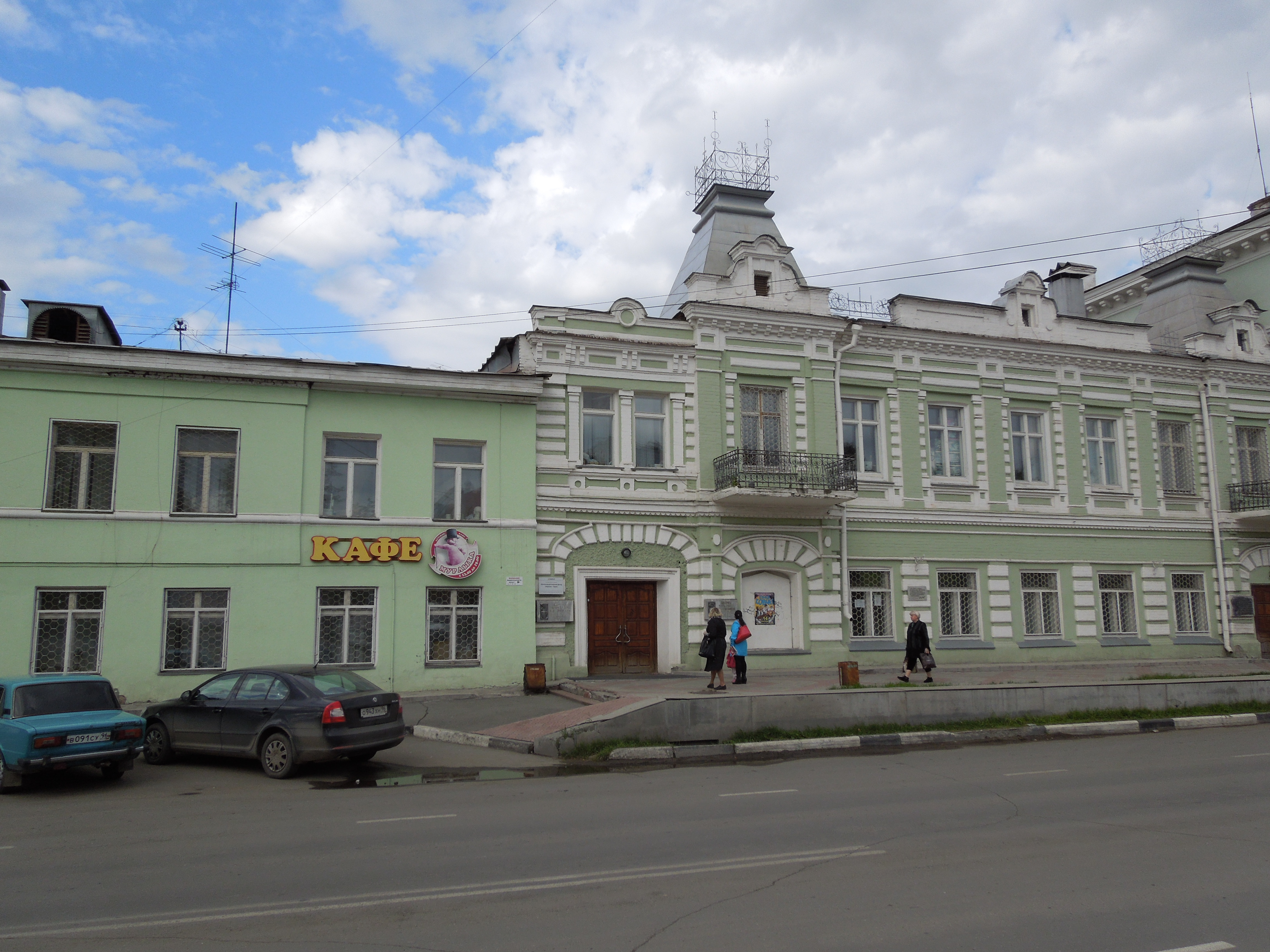 Дом купца Ляпцева в стиле «модерн» (Свердловская область, Нижний Тагил, улица Карла Маркса, 37)